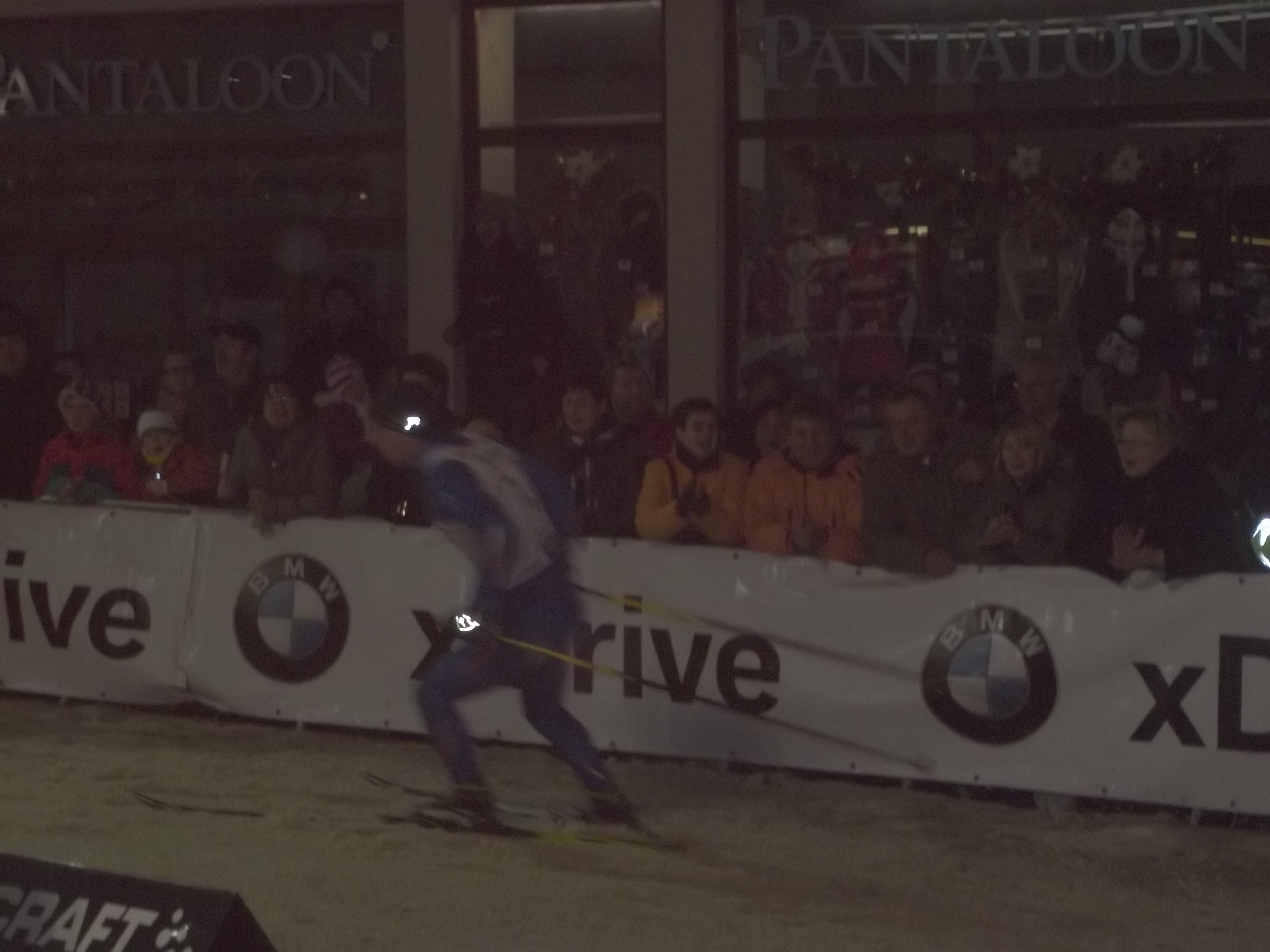 Karlovy Vary